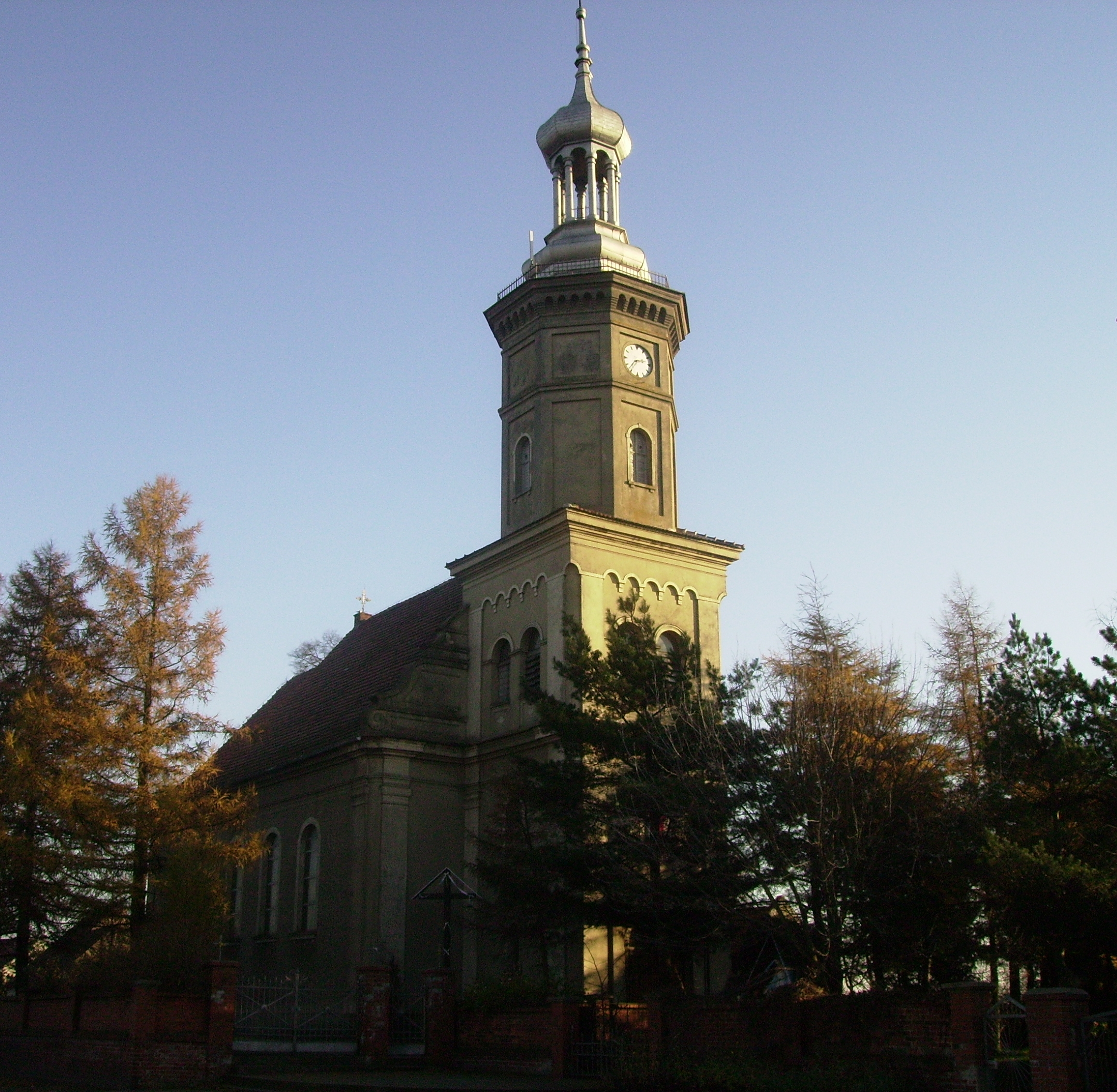 Potarzyca - kościół parafialny pw. Podwyższenia Krzyża